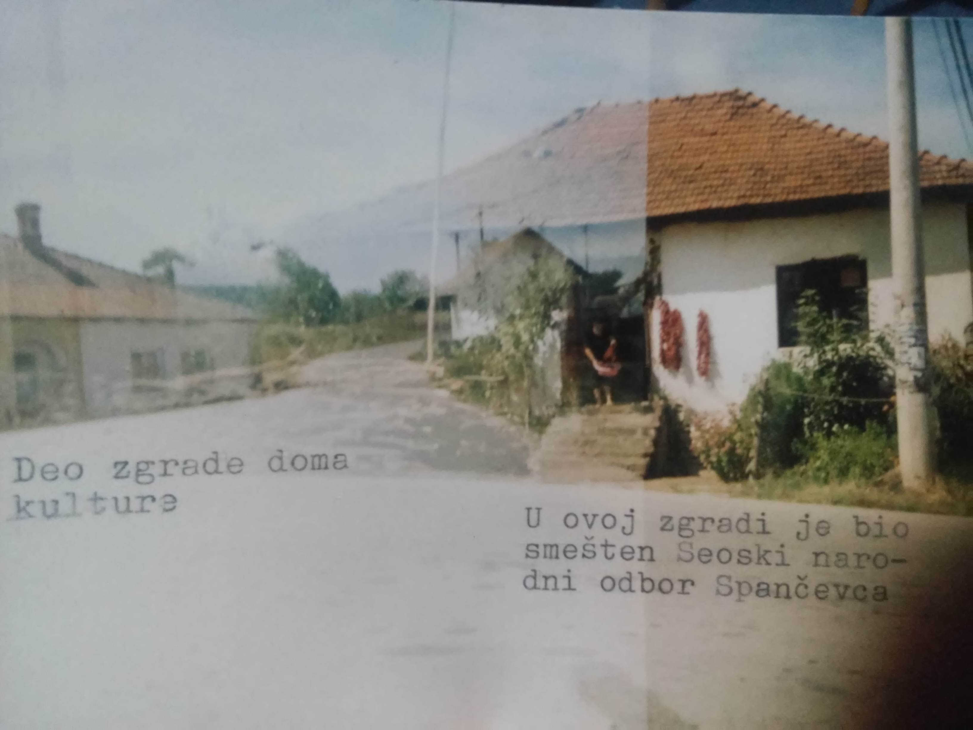 Део зграде дома културе